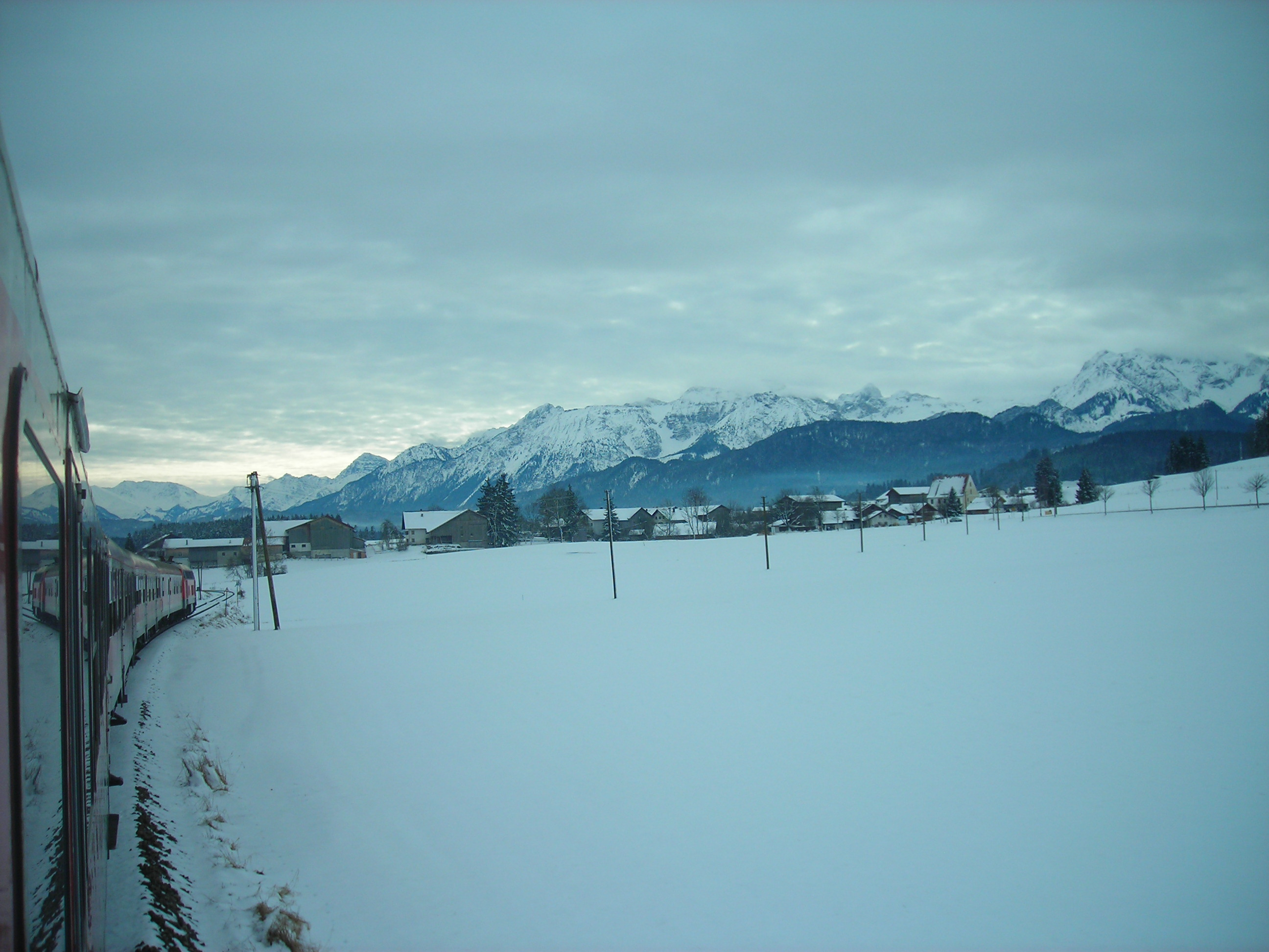 A Biessenhofen–Füssen vasútvonal